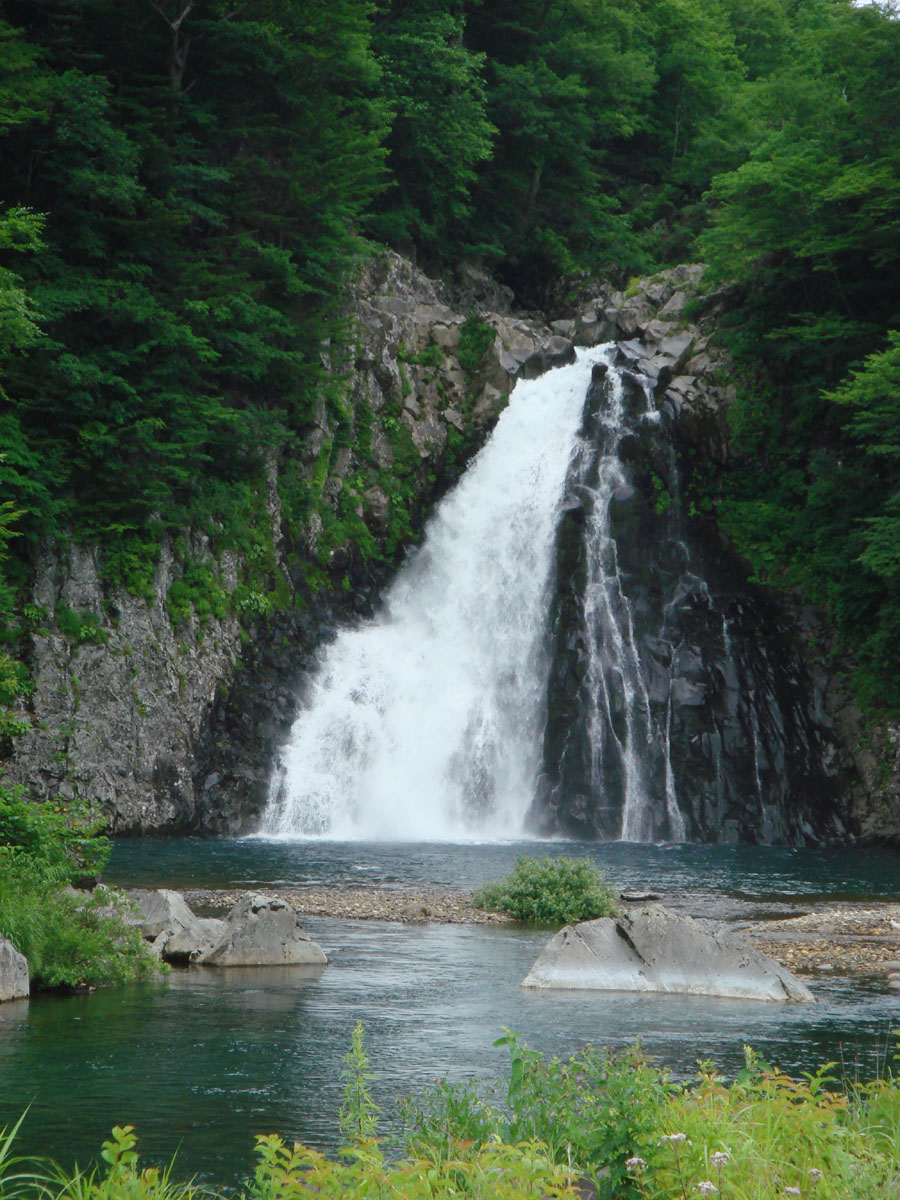 Hōttai Falls, Yurihonjō, Akita